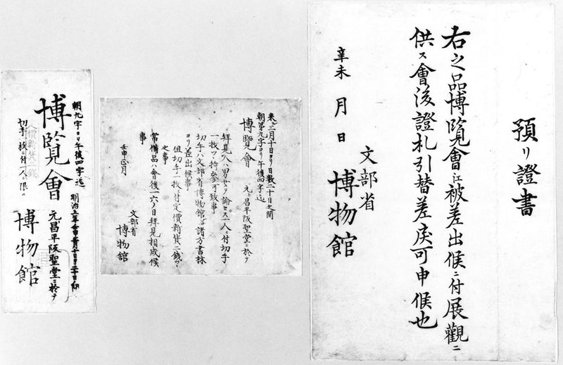 1872年（明治5年）に行われた湯島聖堂博覧会 観覧券・広告・預証書